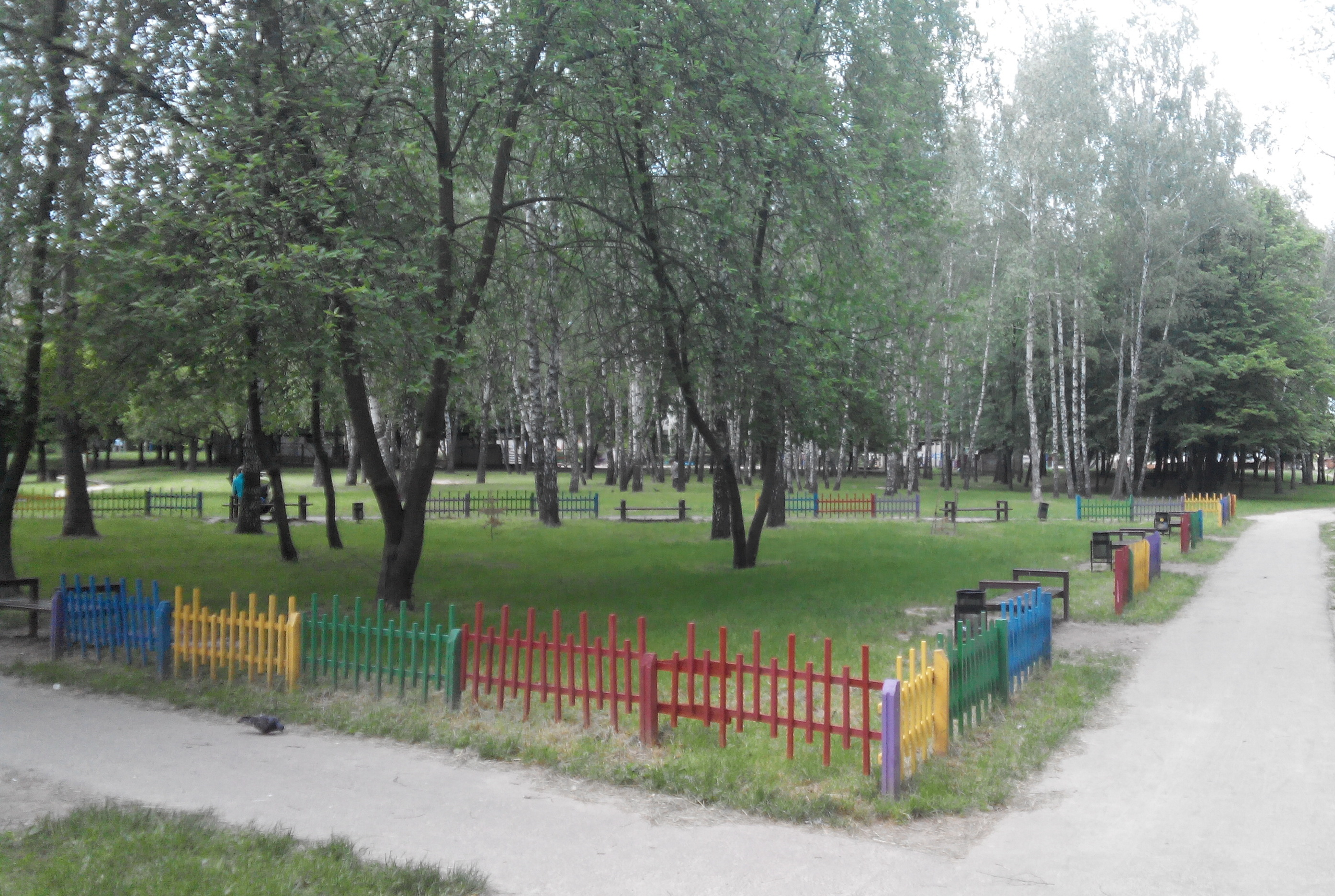 Березовий гай в Чернігові